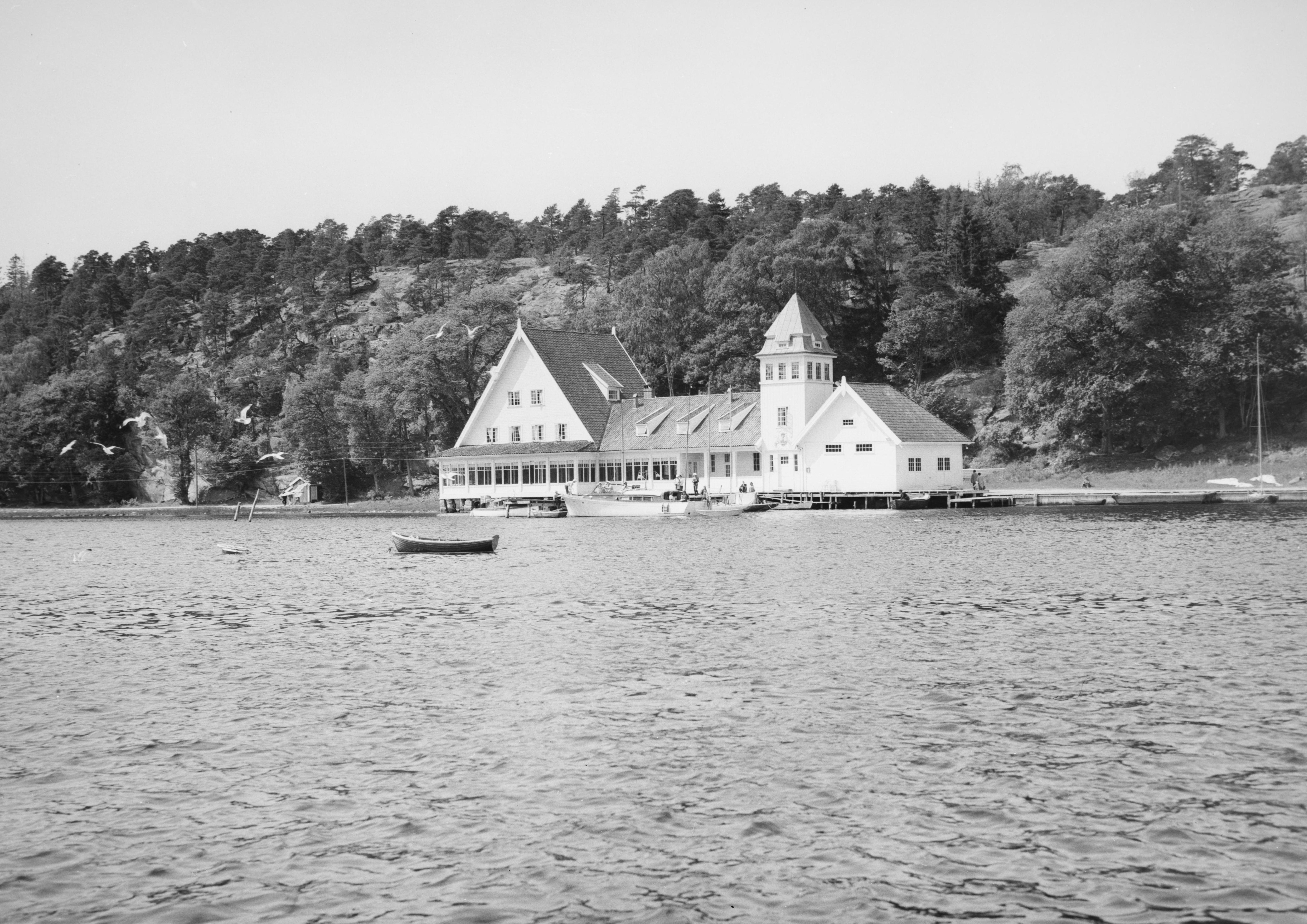 Bildet er hentet fra Nasjonalbibliotekets bildesamling Hankø, Fredrikstad, Østfold